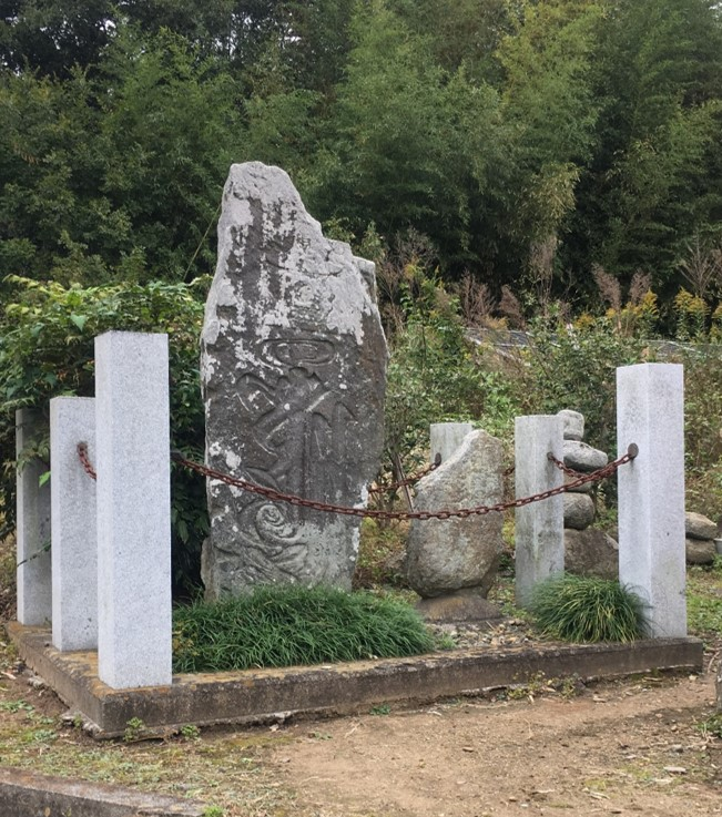 毘沙門天種子の画像です。